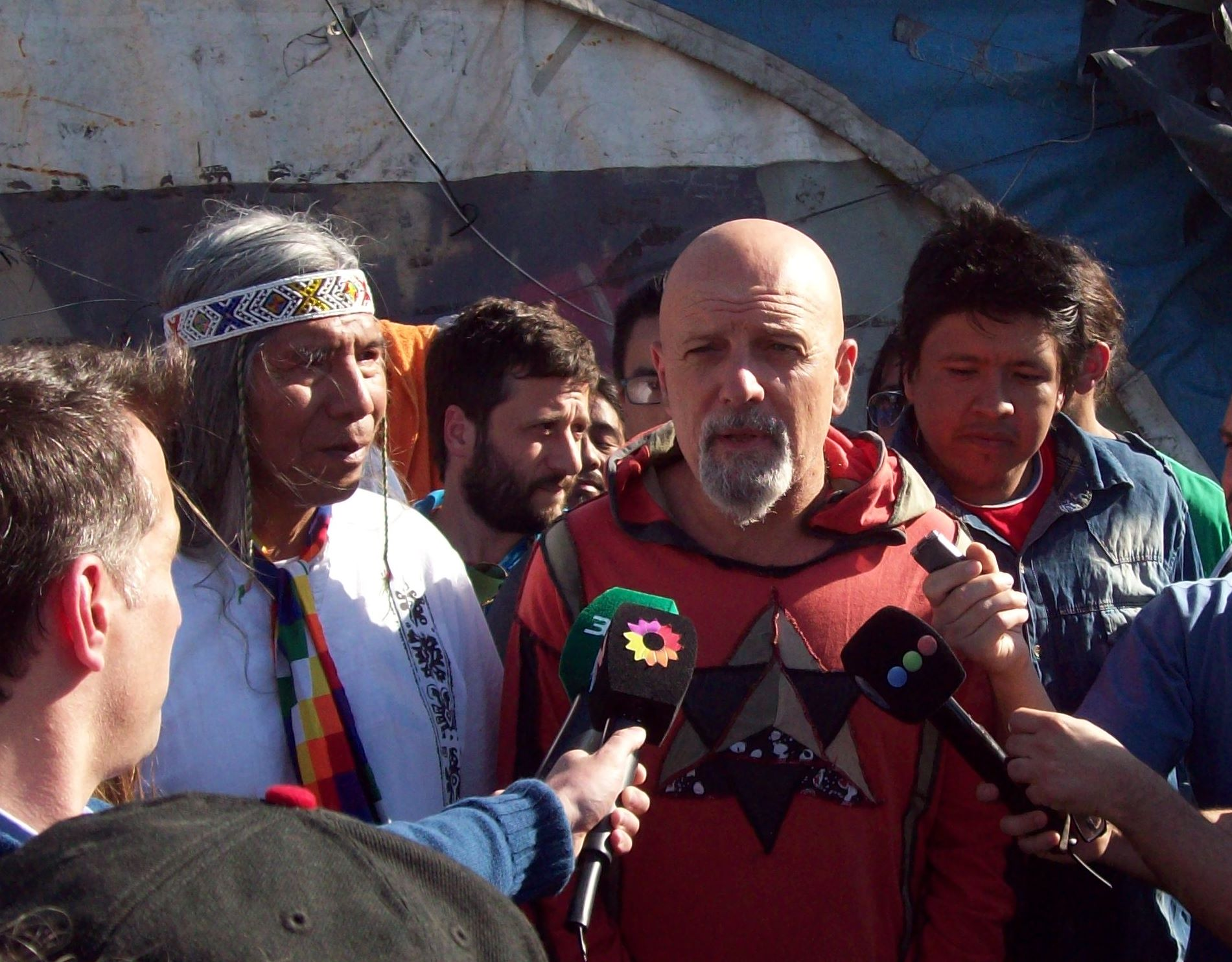 El qarashé Félix Díaz de los Qom junto a Gustavo Cordera en el acampe Qom en la Avenida 9 de Julio y Avenida de Mayo, en la ciudad autónoma de Buenos Aires.